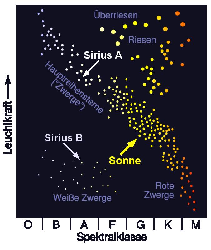 Ein vereinfachtes Hertzsprung-Russell-Diagramm mit der Sonne, Sirius A und Sirius B.